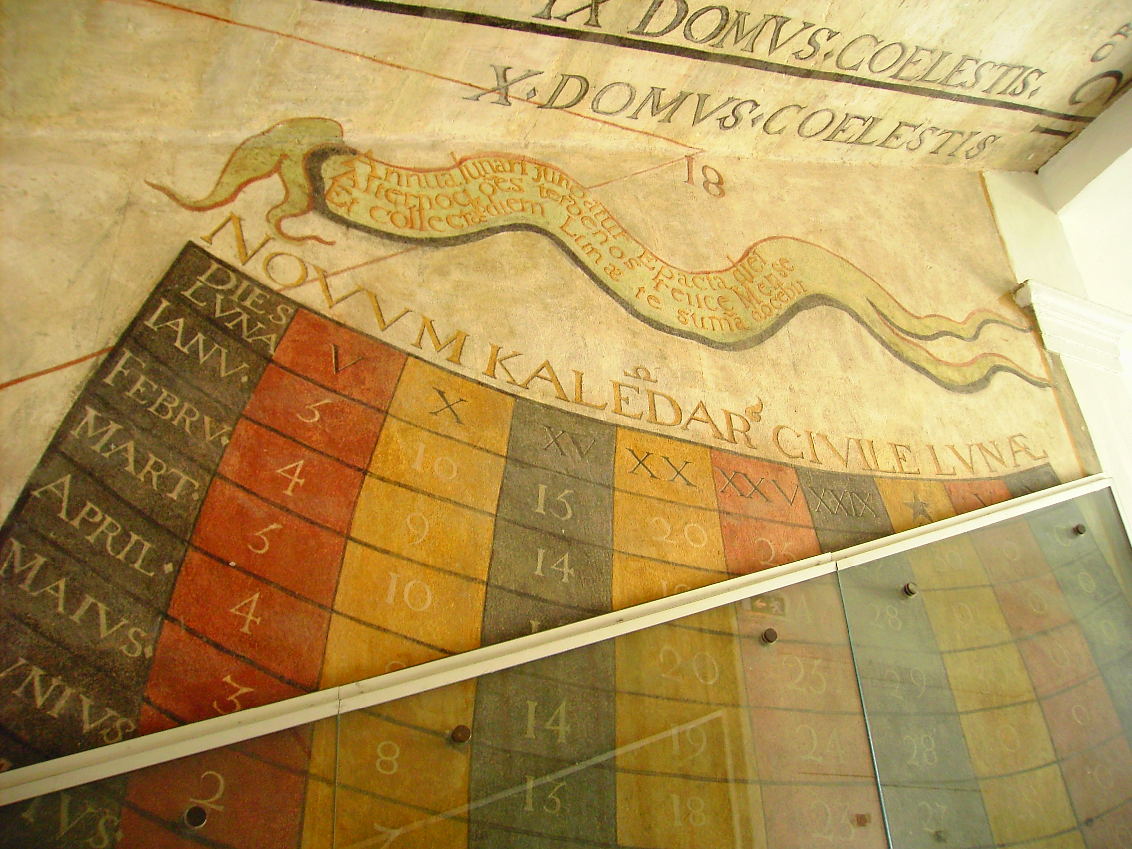 Cadran solaire unique datant de 1673 ,dans l'escalier du Lycée Stendhal à Grenoble